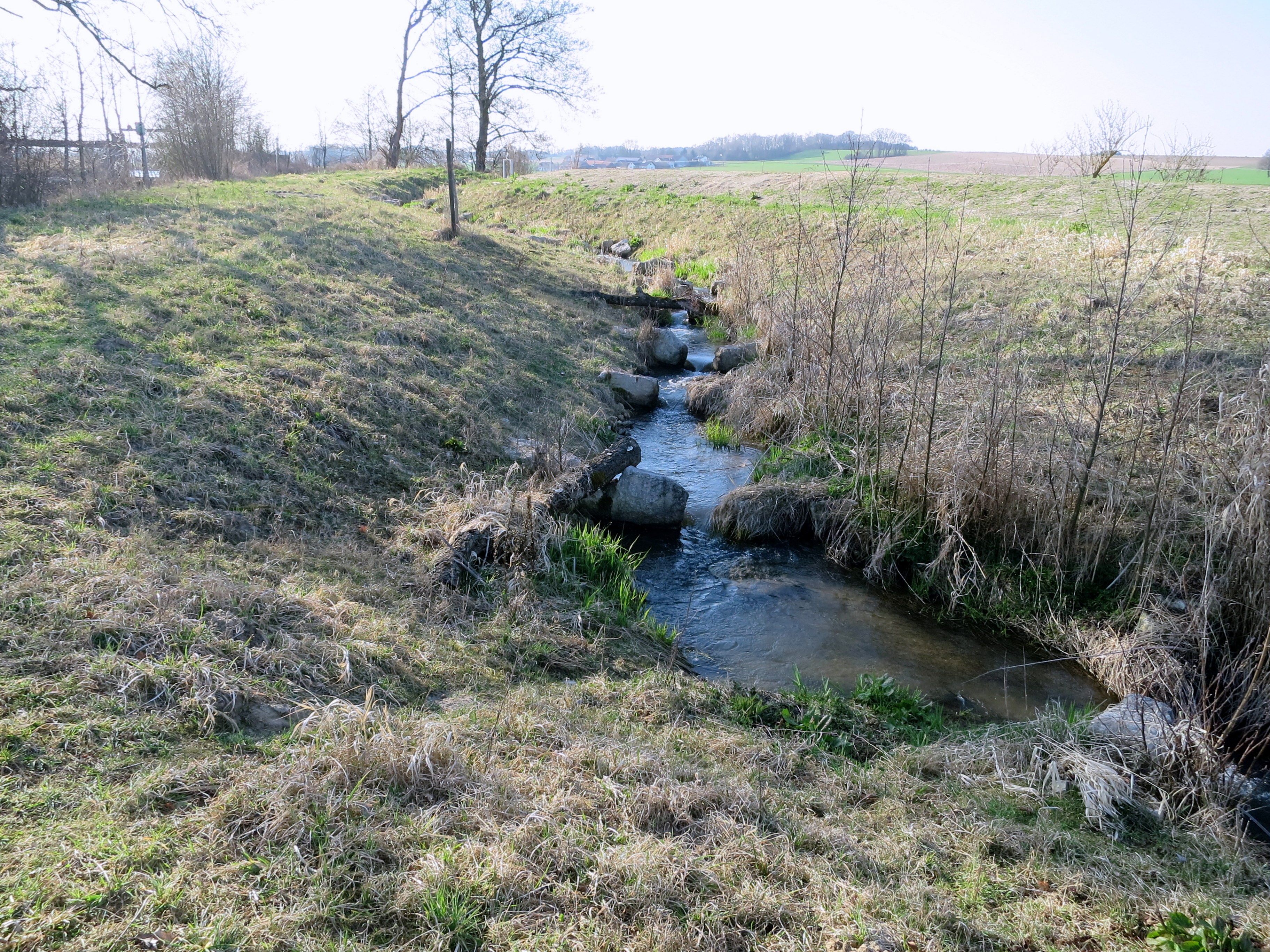 Die sich schlängelnde Fischtreppe